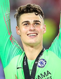 مسابقه چلسی و آرسنال، فینال لیگ اروپا ۲۰۱۹